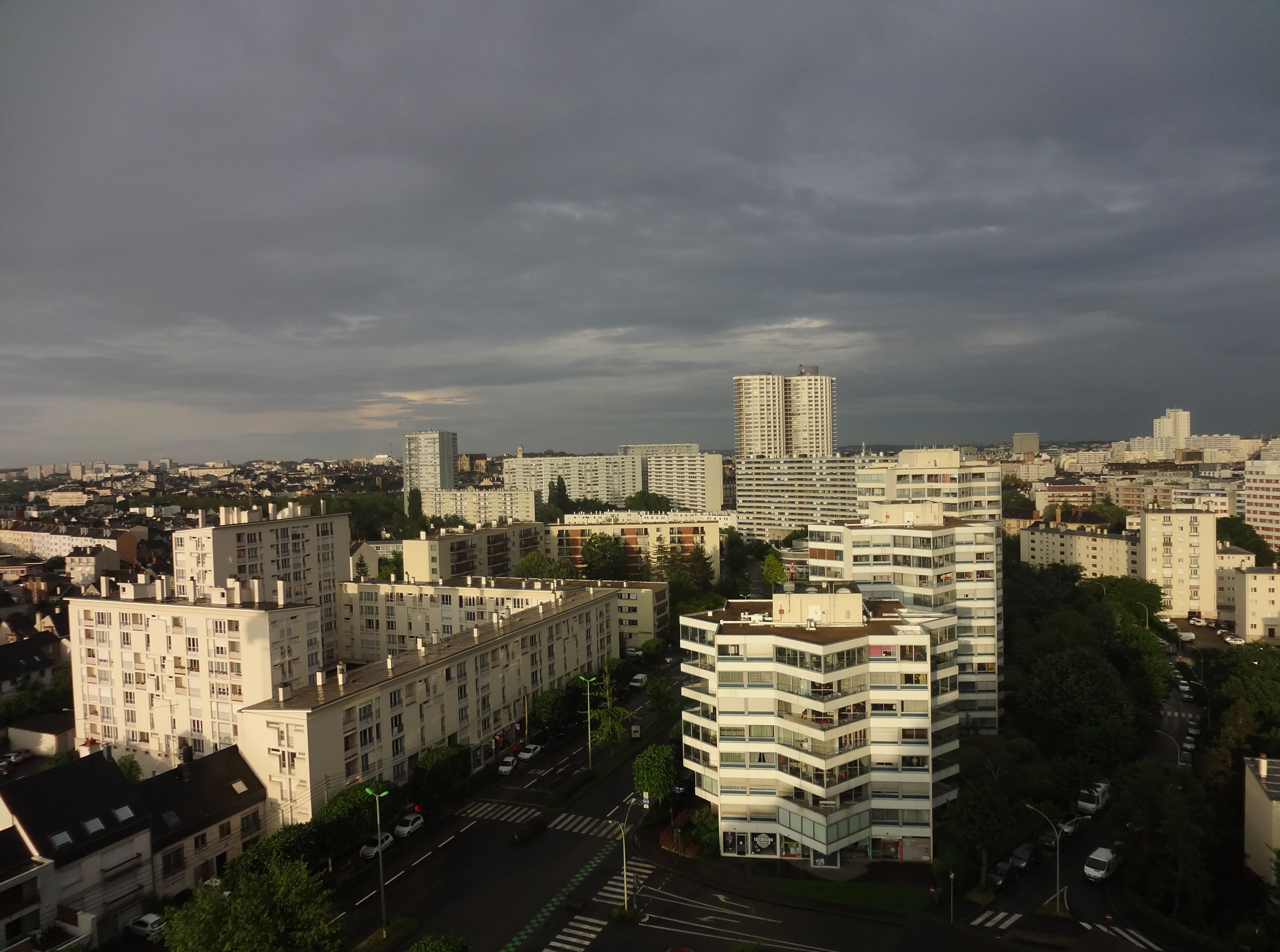 Quartier Bourg l'Evesque, Rennes.